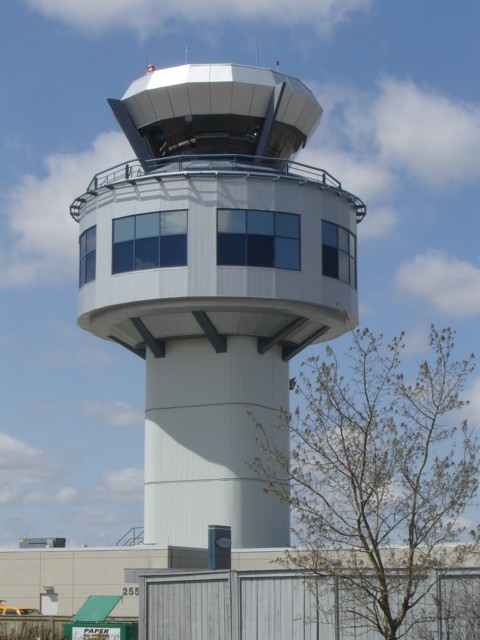 Saskatoon John G. Diefenbaker International Airport